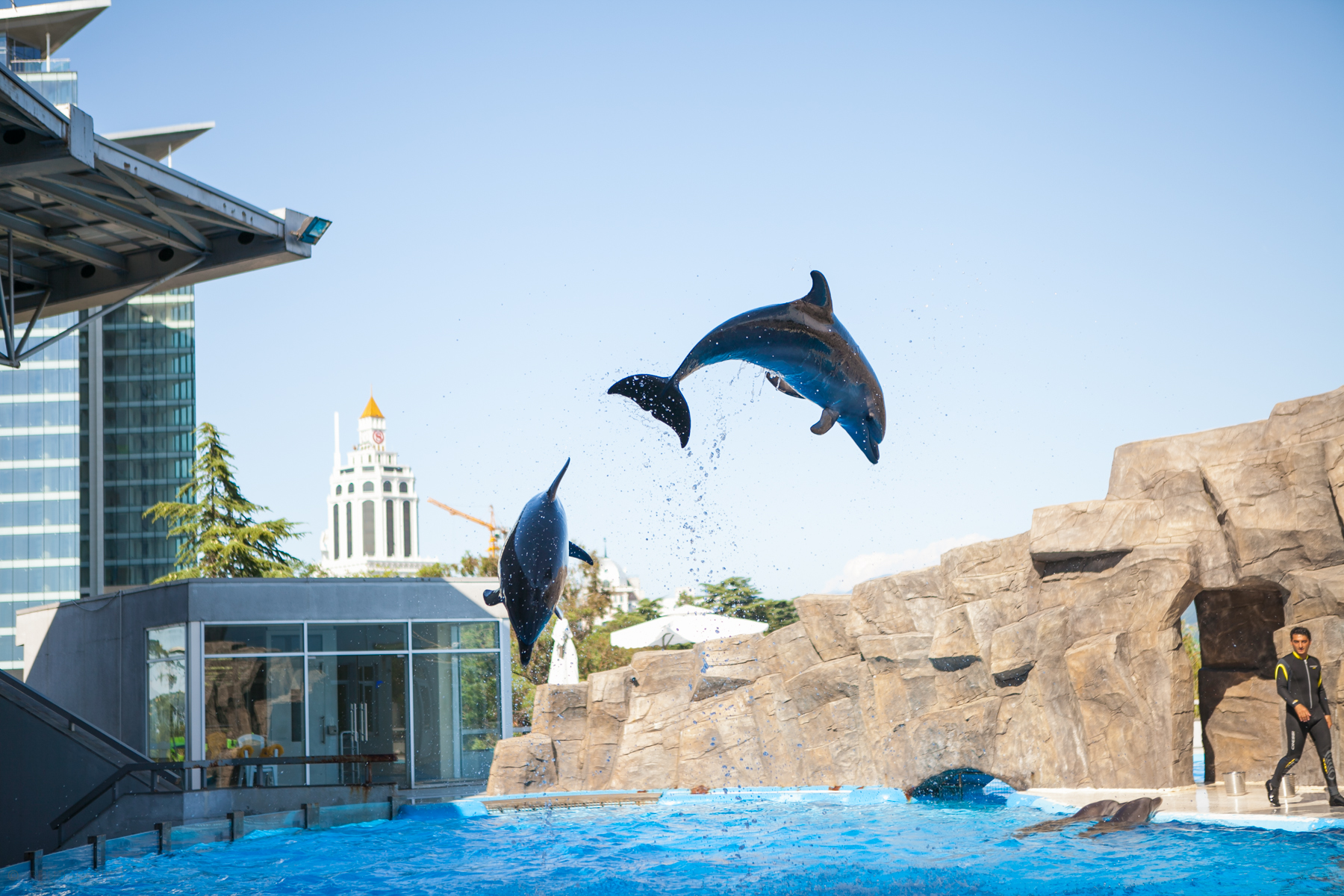 _MG_3891